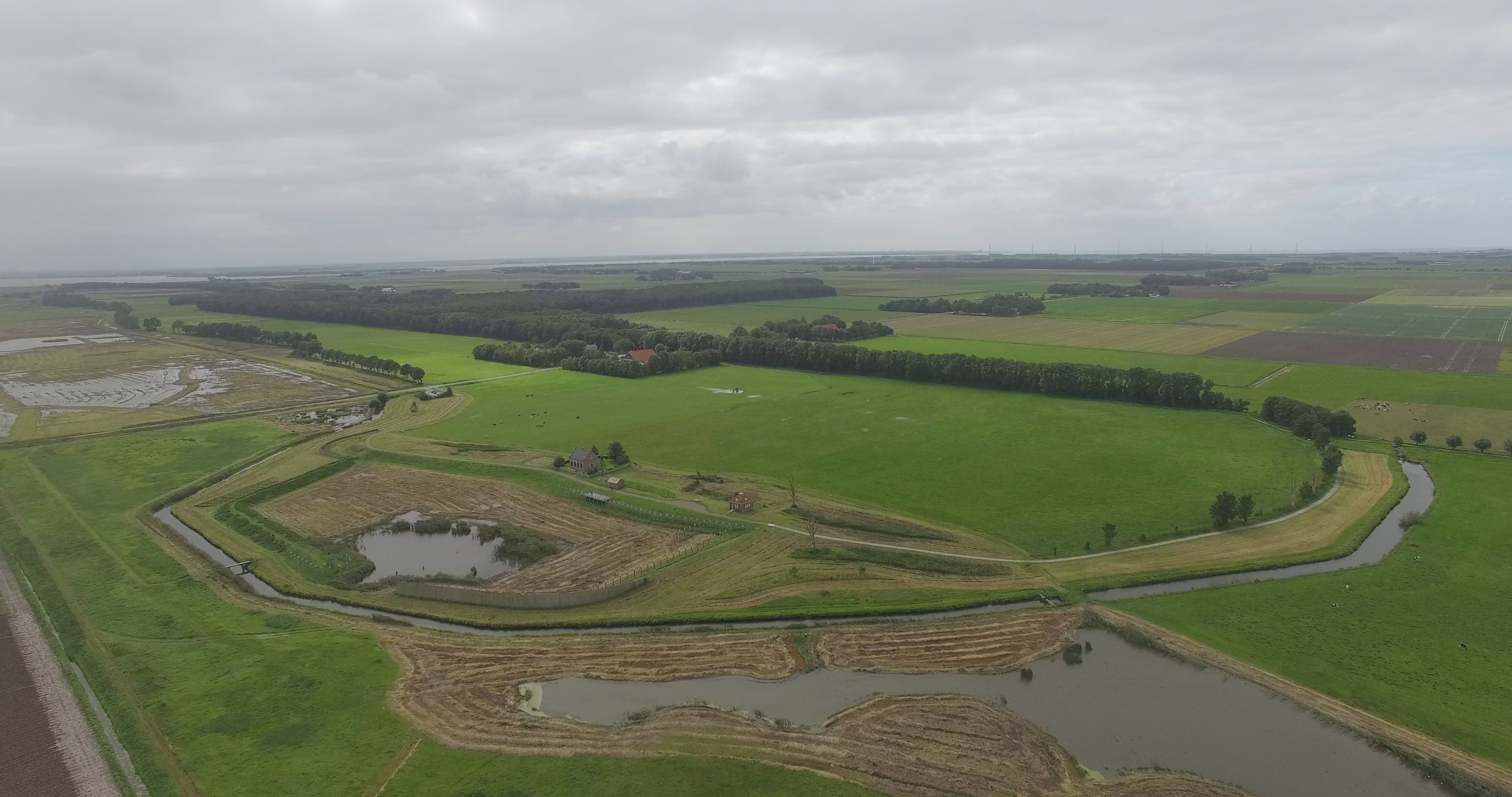 Schokland